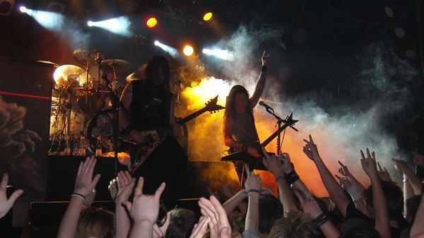 Trivium i Pumpehuset april 07